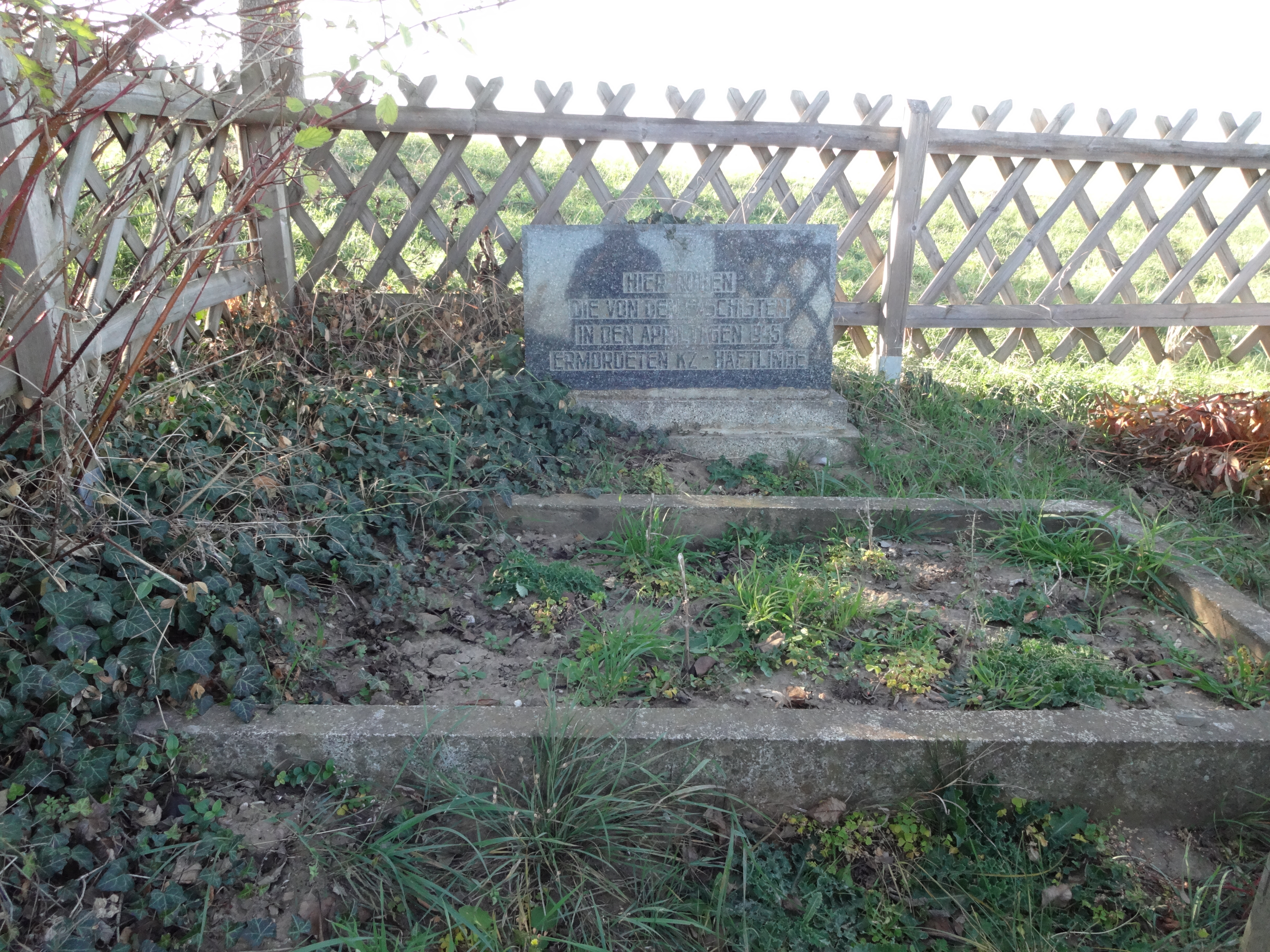 denkmalgeschützte Gedenkstätte für während des Todesmarsches umgekommenen KZ-Häftlinge in Badeborn (außerhalb der Ortslage)